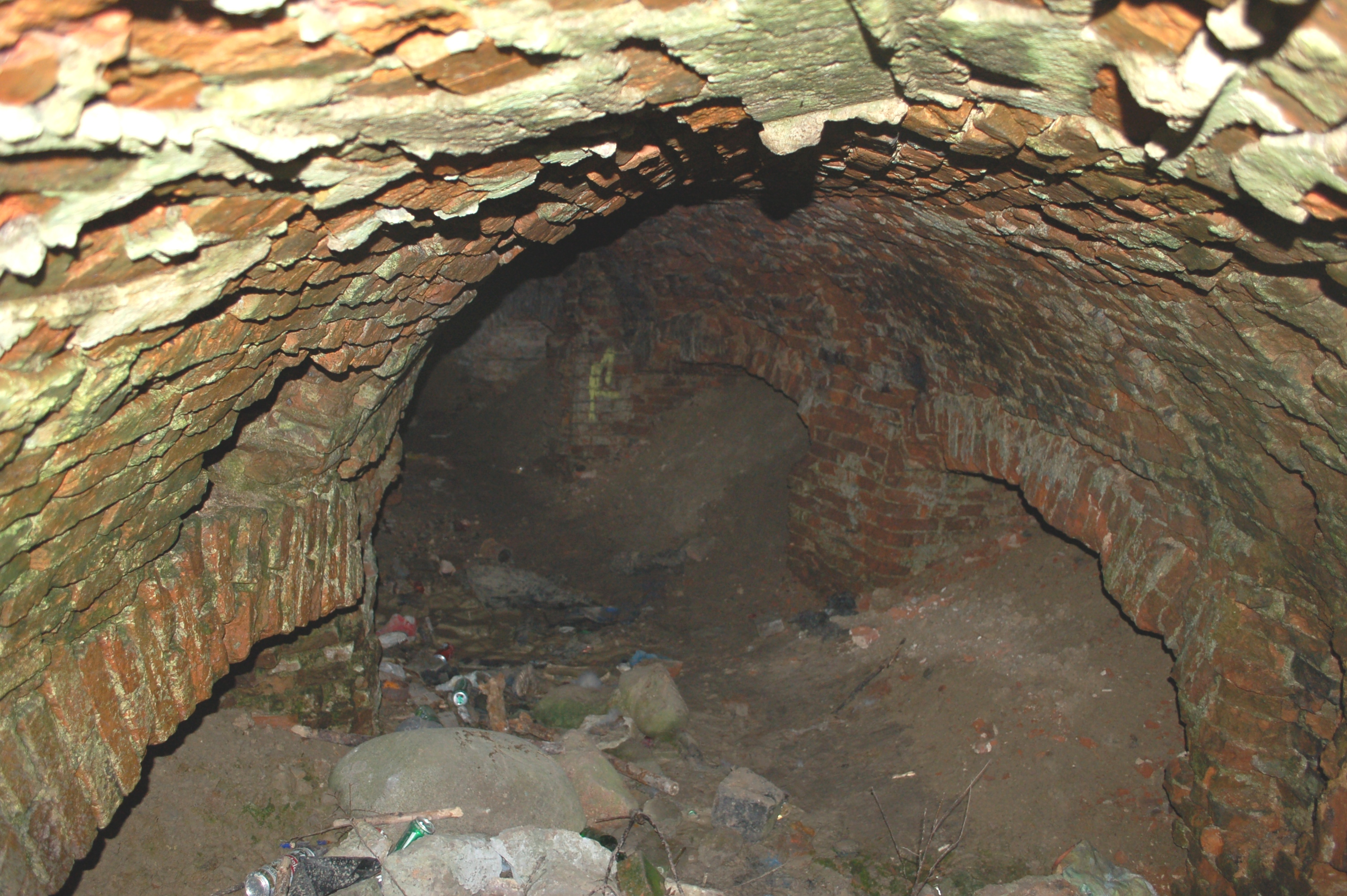 Gucin Gaj Warsaw